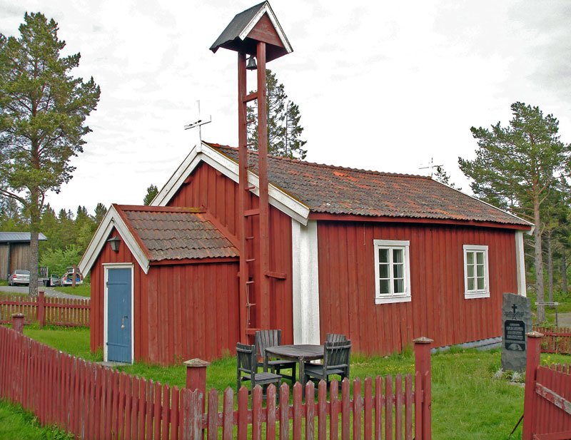 Skeppsmalns kapell i Grundsunda församling, Örnsköldsviks kommun, fotograferat juni 2012.